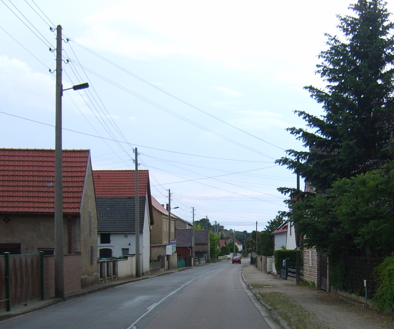 Prestewitz